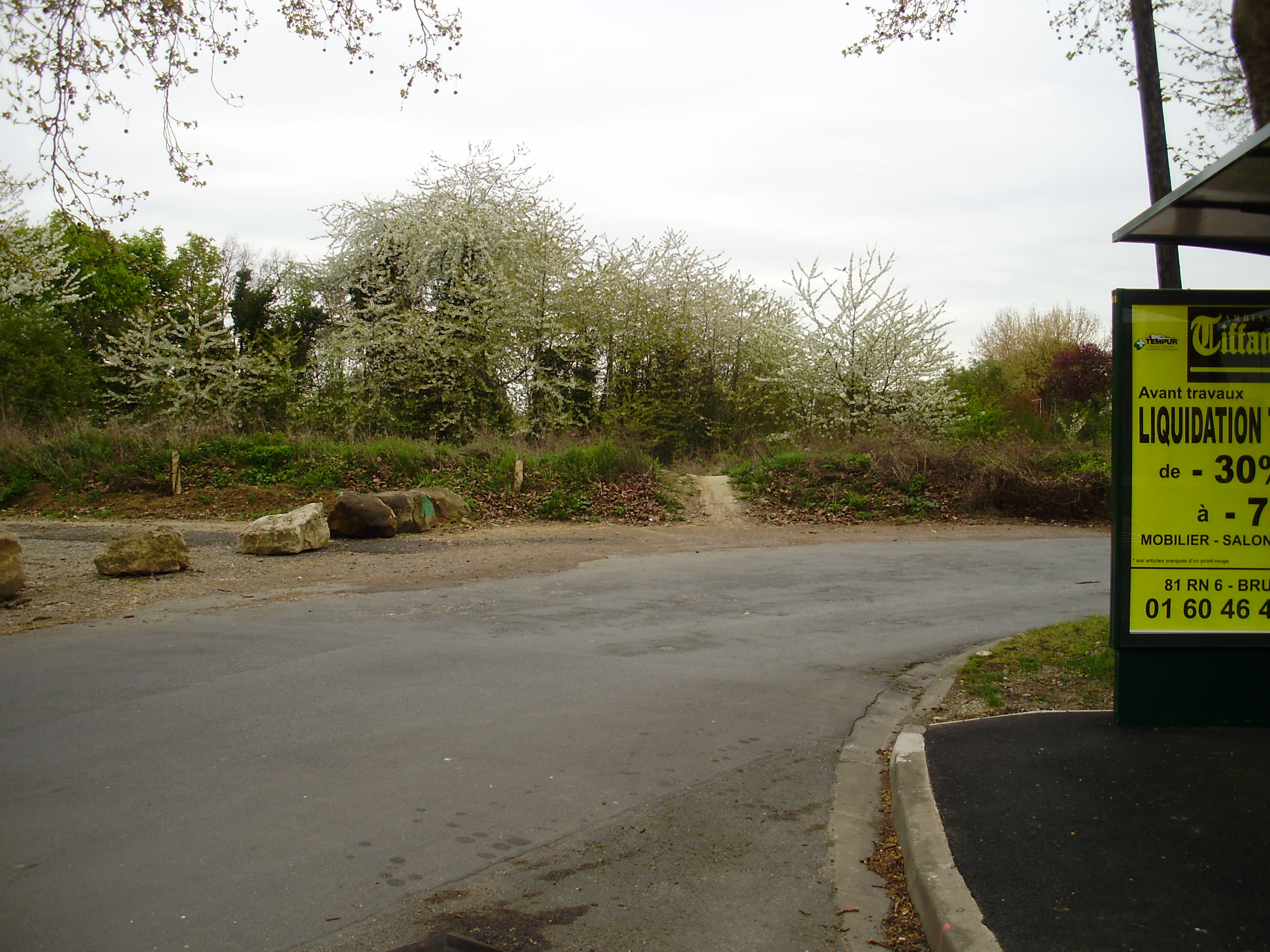 Site de l'ancienne gare de Santeny - Servon (près de la rue du Château d'eau), à Santeny, Val-de-Marne, France : l'ancienne gare, démolie en 2009, était derrière la bordure de terre.